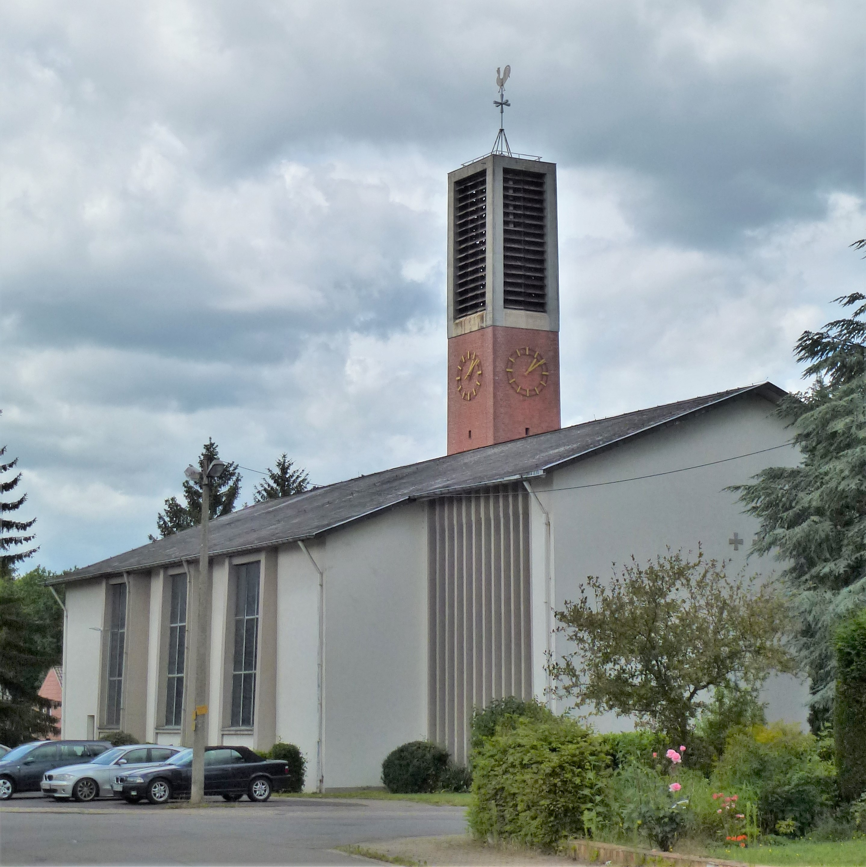 Rückansicht aus dem Drosselweg.